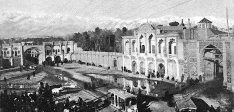 Tehran, Iran